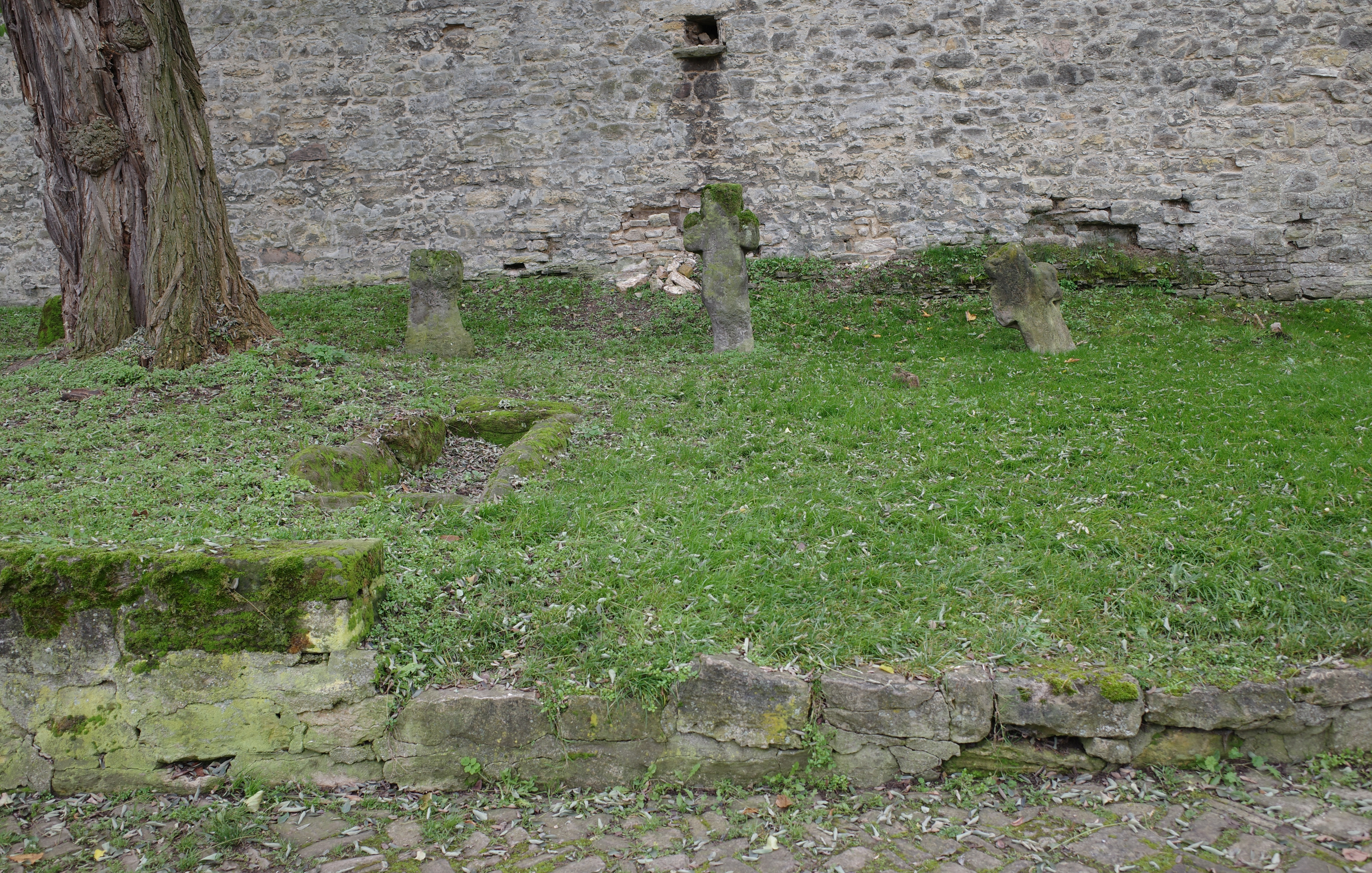 Querfurt, 3 Sühnekreuze an der Nordostbastion der Burg Querfurt.